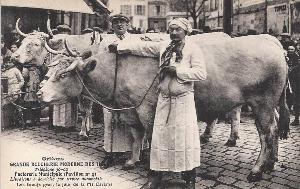 Présentation de Bœufs gras à Orléans, le jour de la Mi-Carême.